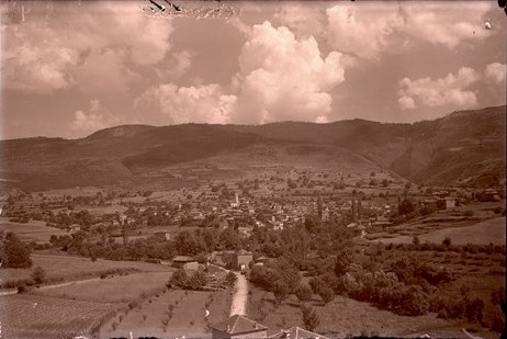 Изглед от с. Павелско, Смолянско.